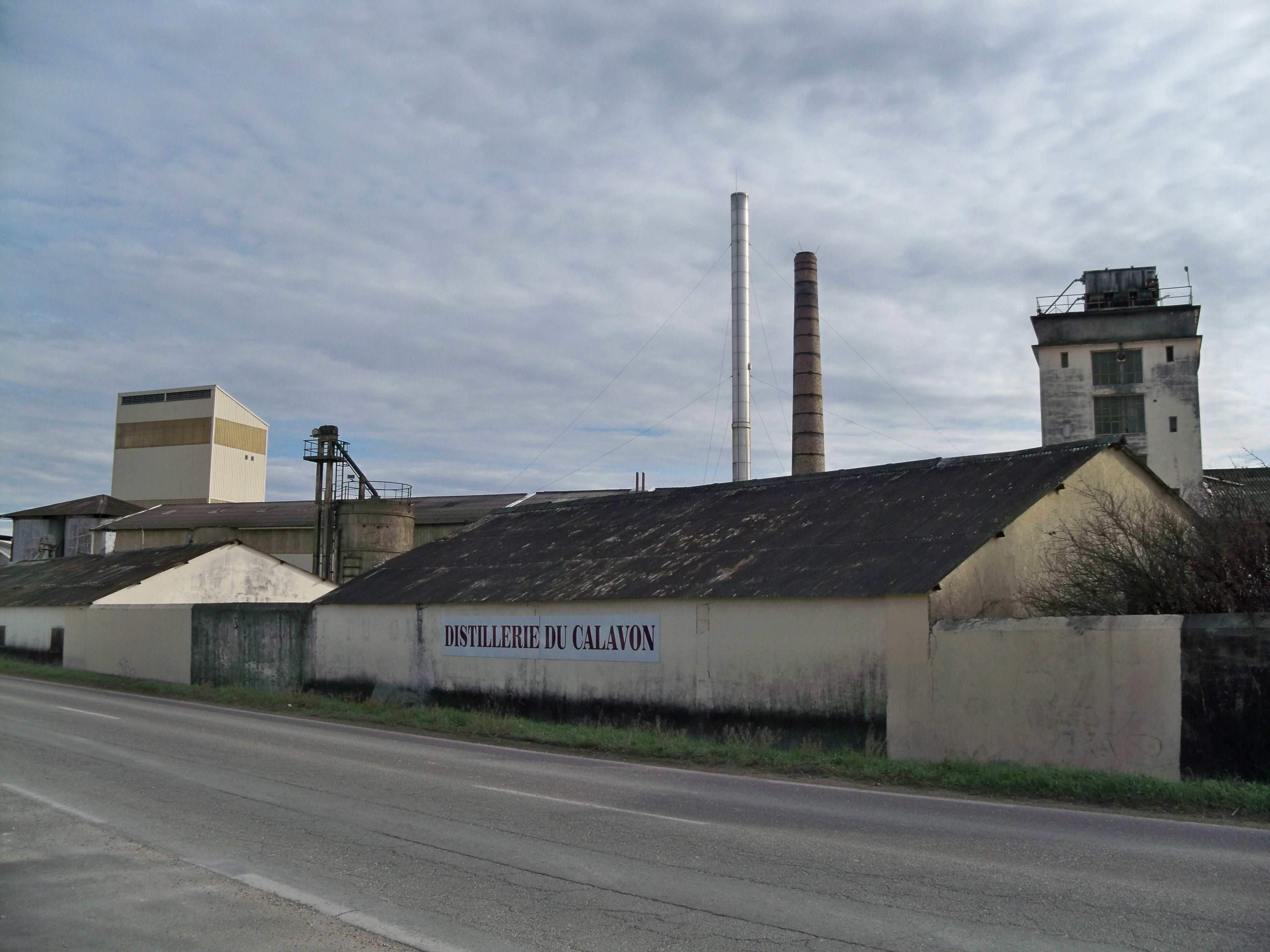 distillerie à Coustellet (84)